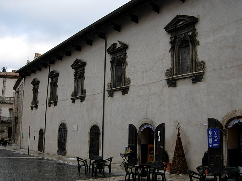 Palazzo Fanzago a Pescocostanzo (AQ) Foto personale